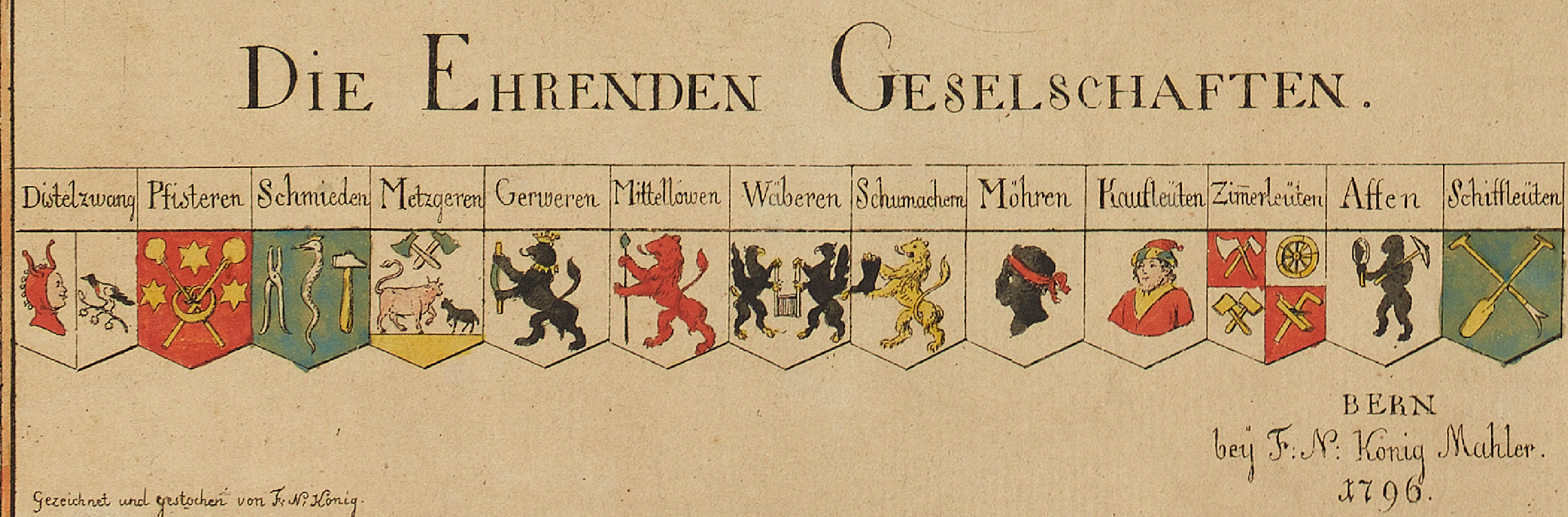 König, Wappen der bernischen Gesellschaften 1796